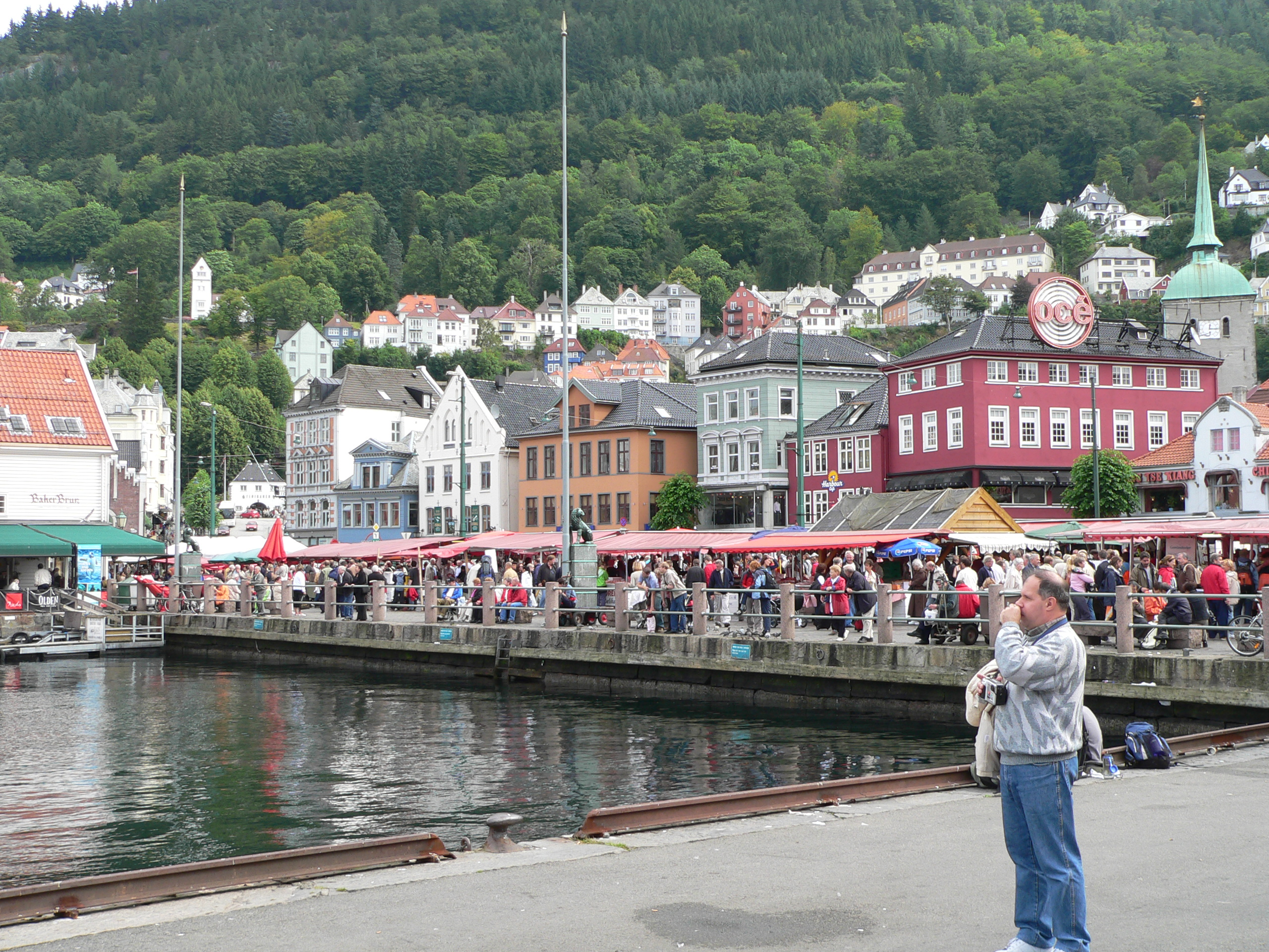 Fisketorget.